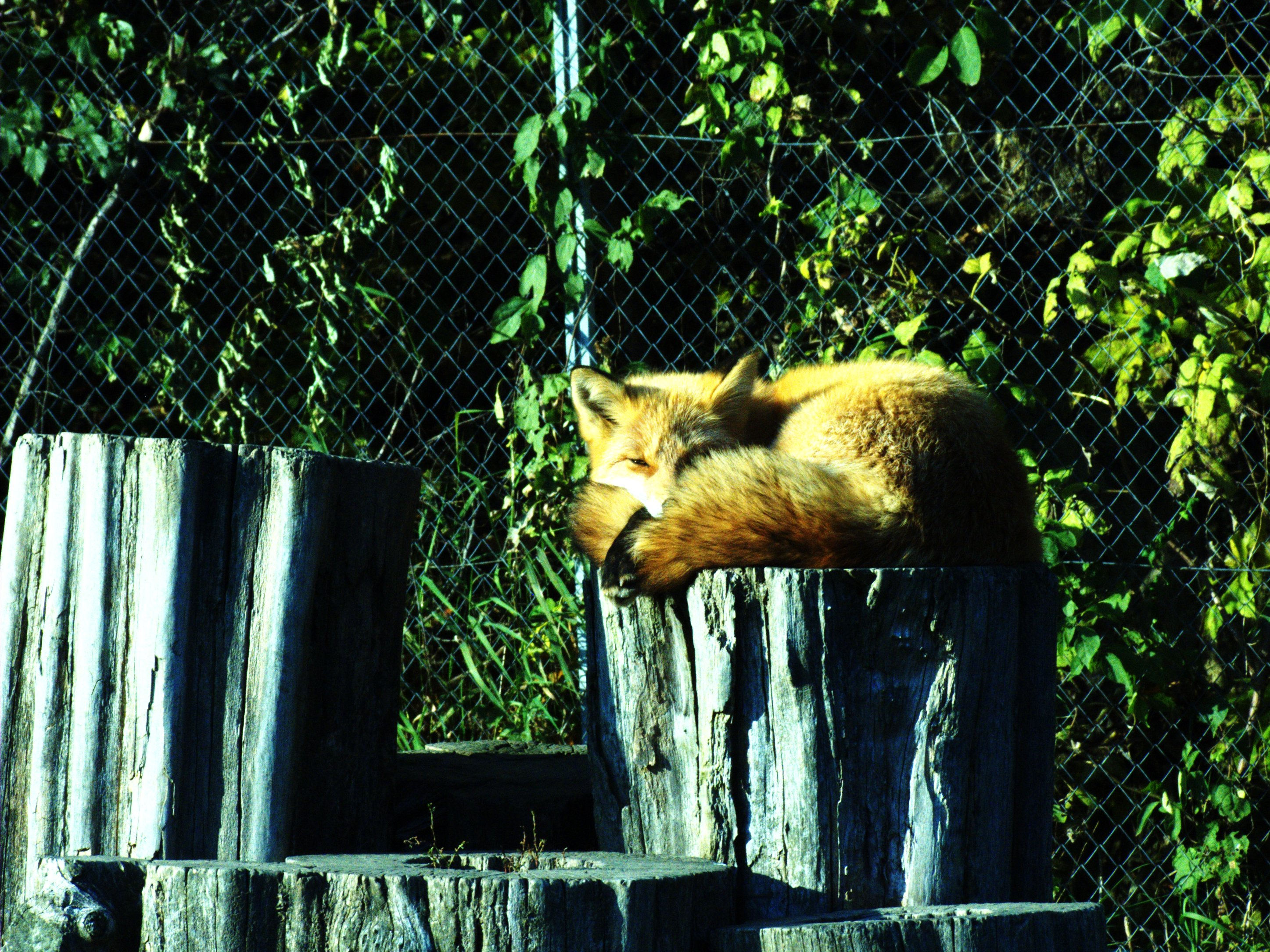 北きつね牧場。留辺蘂（るべしべ）、温根湯（おんね湯）温泉。北海道北見市。